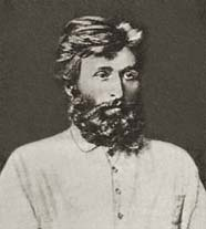 Джабадари Иван Спиридонович - русский революционер-народник